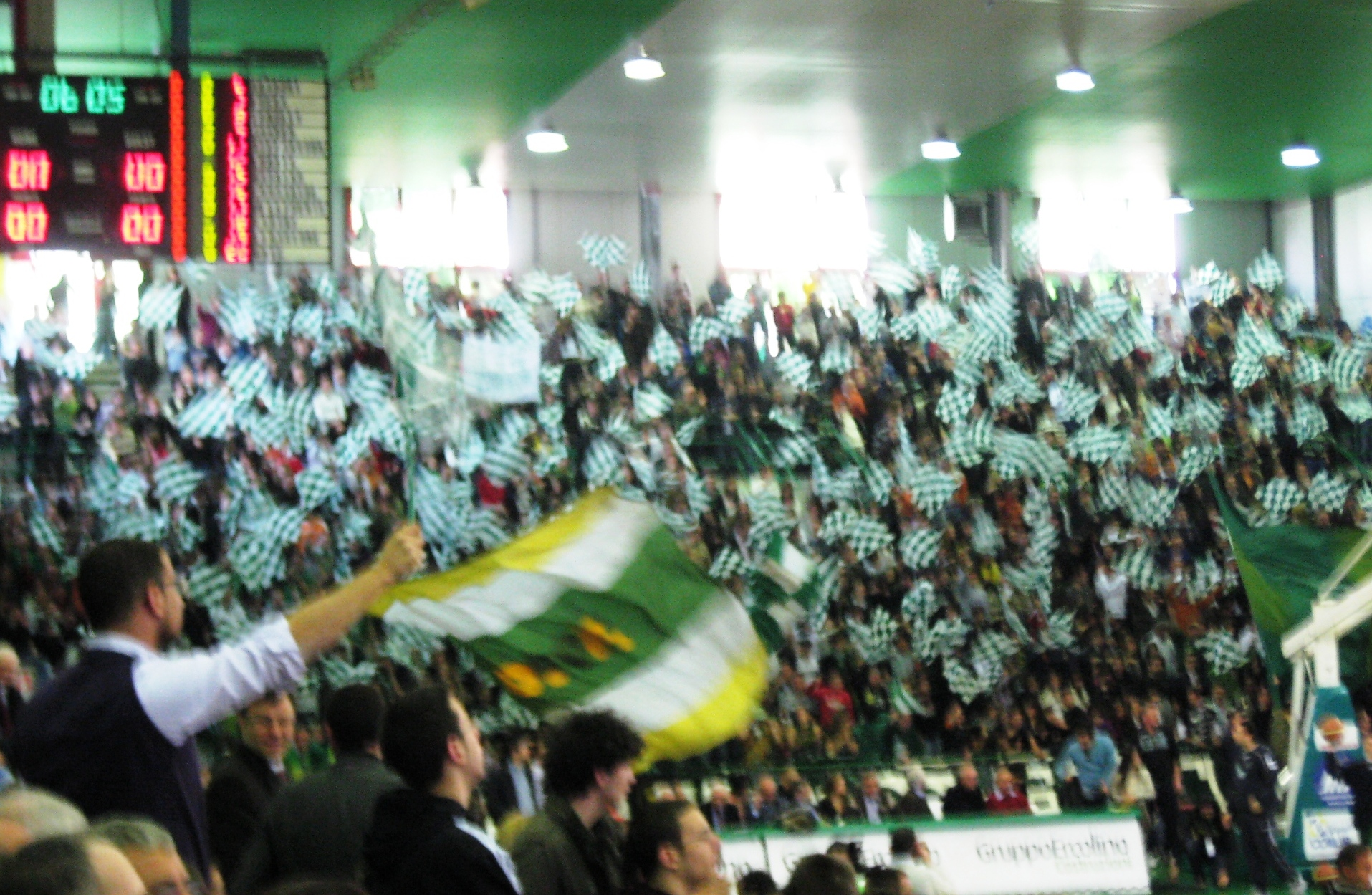 tifosi Felice Scandone Avellino (Original Fans)